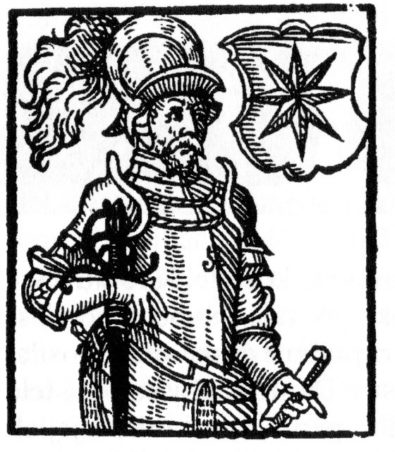 Jan Starší ze Šternberka